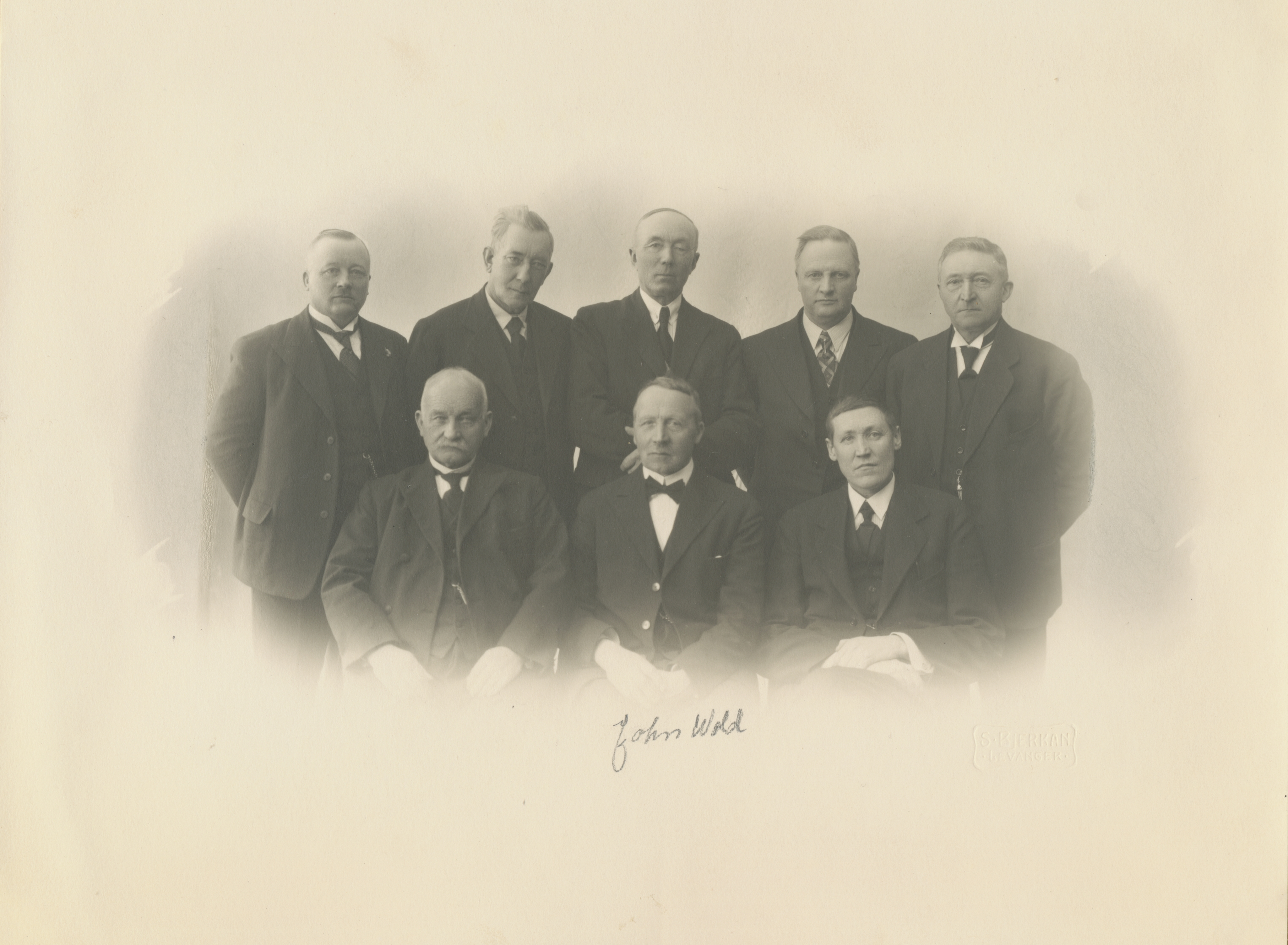 Nord-Trøndelag fylkesting, trolig en gang i tida 1923-25 eller 1932-37, periodene John J. Wold (1870-1951, i midten bak) var ordfører i Åsen. Om ham, se Bygdebok for Åsen bind 2, s. 390. Fotograf / Photographer: S. Bjerkan, Levanger Fotoeier / Photo owner: Margaret Wibe Digitalisering / Digitizing: Arne Langås, 2011 Foto-ID / Photo ID: 067-0035 Har du utfyllende opplysninger? Legg gjerne igjen en kommentar nedenfor eller send e-post til . | Do you have additional information? Please leave a comment or send an e-mail to .